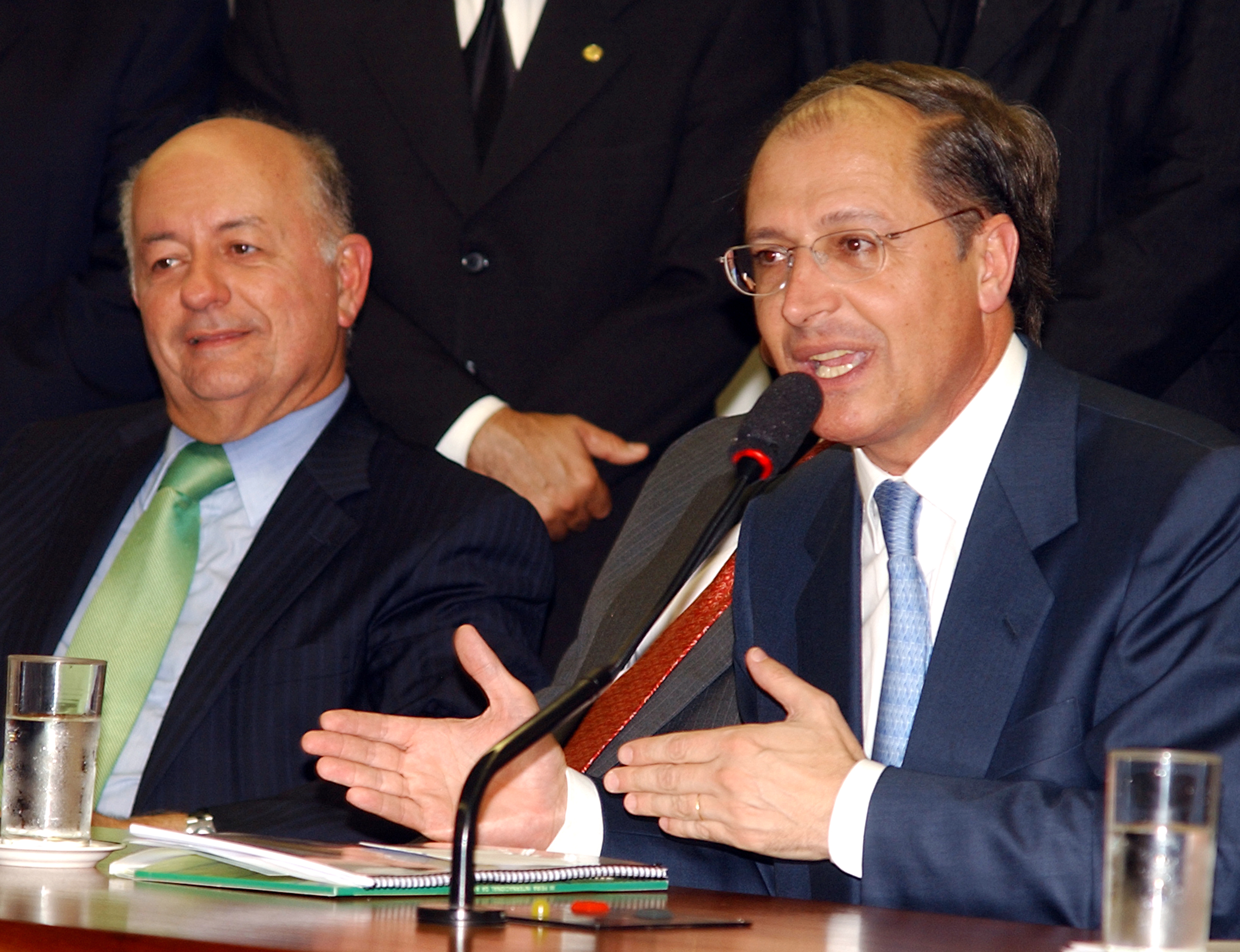 Brasília - O candidato do PSDB à Presidência, Geraldo Alckmin, durante a formalização da aliança entre PSDB e PFL para as eleições de outubro, com o senador José Jorge (PFL-PE), a vice-presidente em sua chapa, no plenário da Comissão de Constituição e Justiça da Câmara.